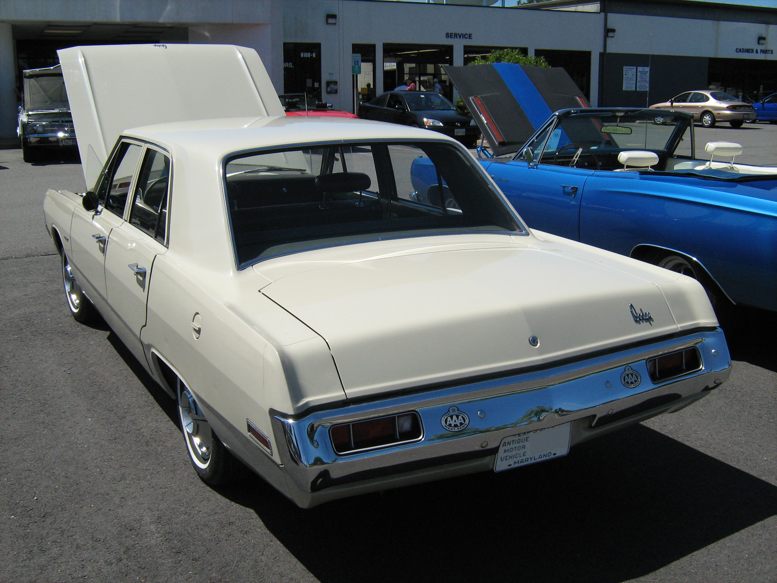 1970 Dodge Dart four-door sedan